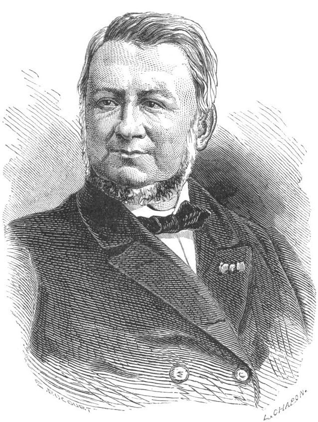 "Me Desmarest, nommé bâtonnier de l'ordre des avocats."